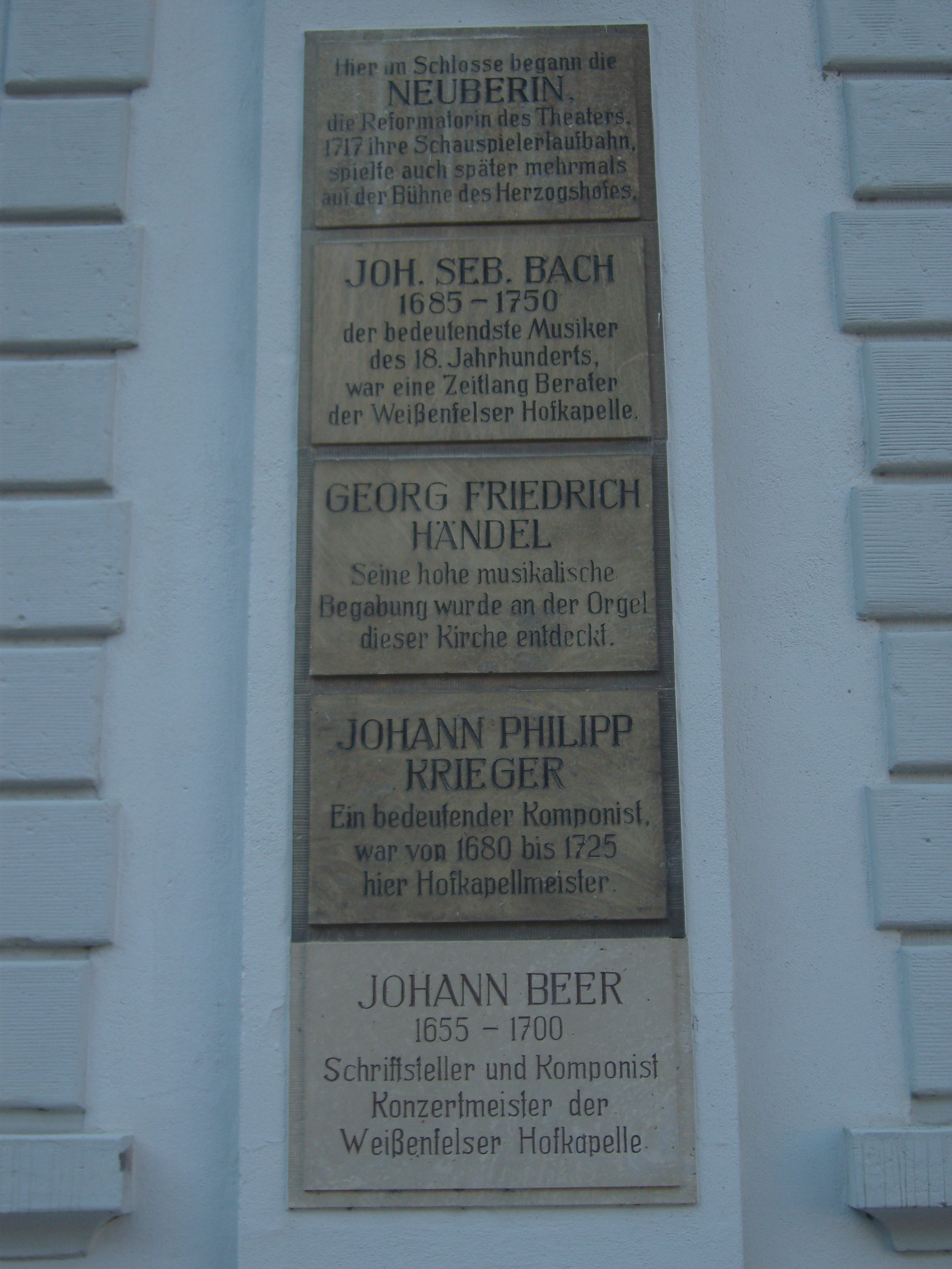 Gedenktafeln am Schloss Neu-Augustusburg in Weißenfels für die Neuberin, Johann Sebastian Bach, Georg Friedrich Händel, Johann Philipp Krieger und Johann Beer